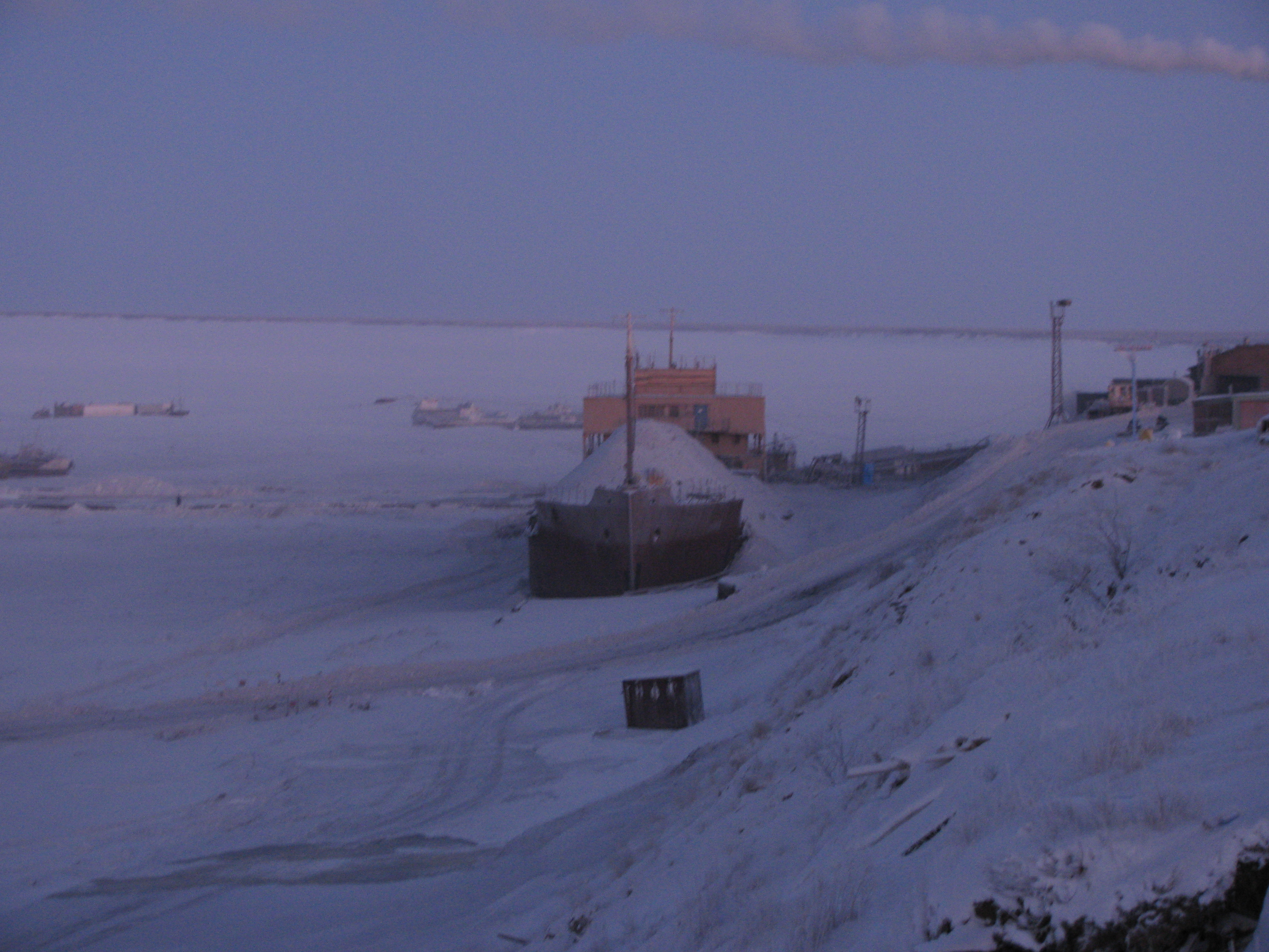 Речной\морской порт. Тут не видно, но левее вмерзшая флотилия кораблей.